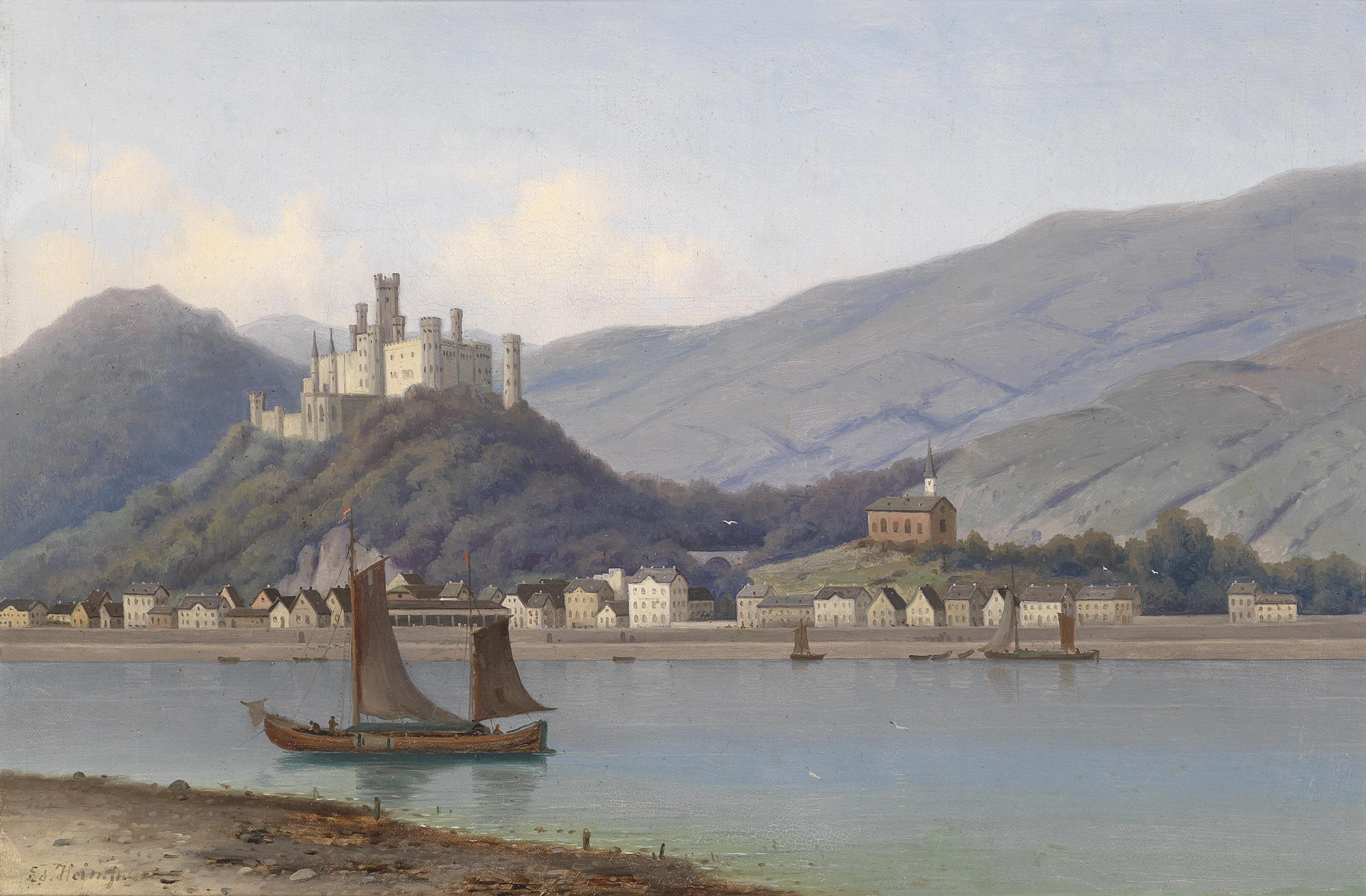 Blick auf Burg Stolzenfels am Rhein, signiert Ed. Hein jr. f., Öl auf Leinwand, 40 x 60 cm